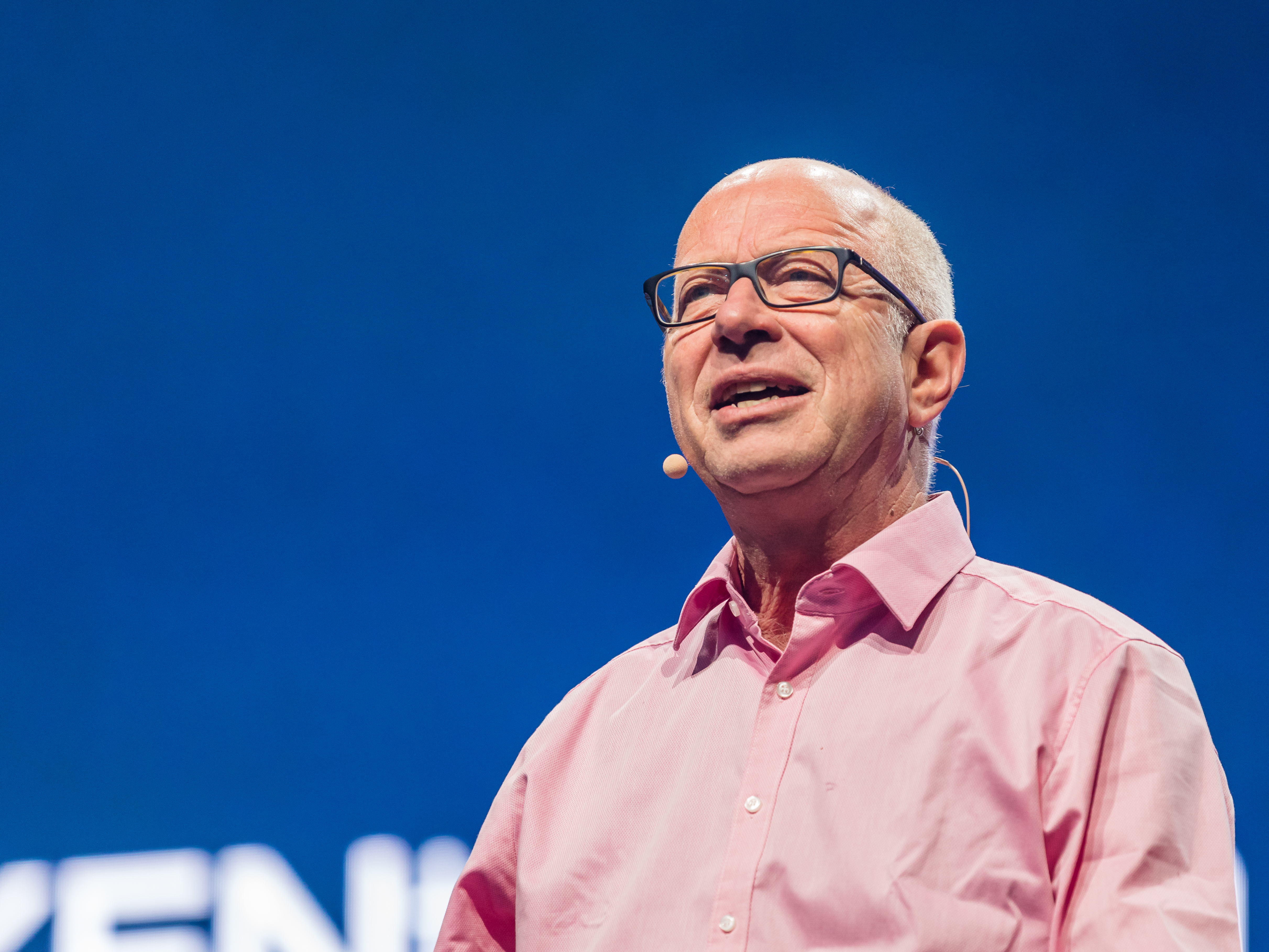 GedankenTanken Köln 2018 - 08 - Robert Betz